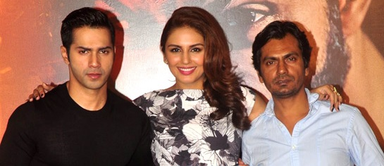 Varun Dhawan, Nawazuddin Siddiqui & Huma Qureshi at Trailer launch of 'Badlapur'